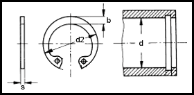 DIN 472